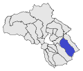 Llo a l'Alta Cerdanya. Mapa elaborat a partir d'un altre mapa de lliure disposició